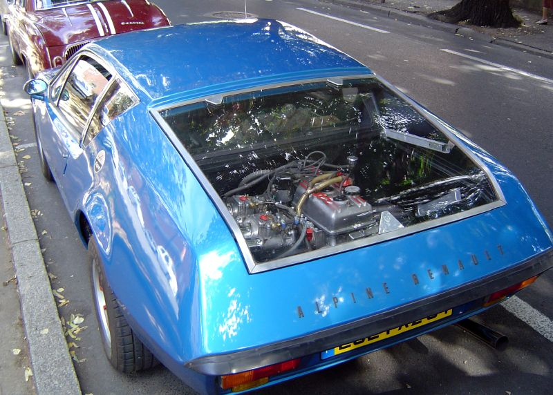 Face arrière d'une Renault Alpine A310.